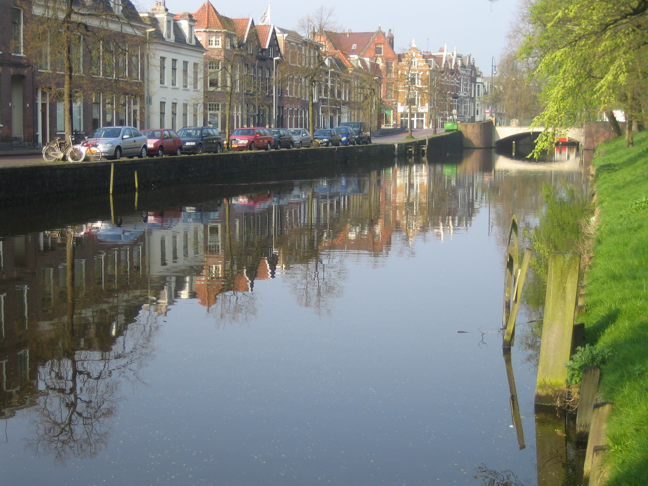 Gvh Amsterdam (Hollande) paysage urbain. Jpg This is not in Amsterdam, but elsewhere in Holland!